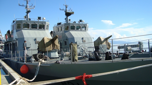 Patrouillenboote Jaco und Betano, Jaco-Klasse (Shanghai-III-Klasse)